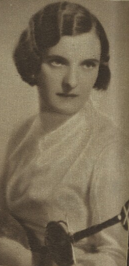 Marie Krůbová Šedivá, mistryně světa v šermu fleretem 1938